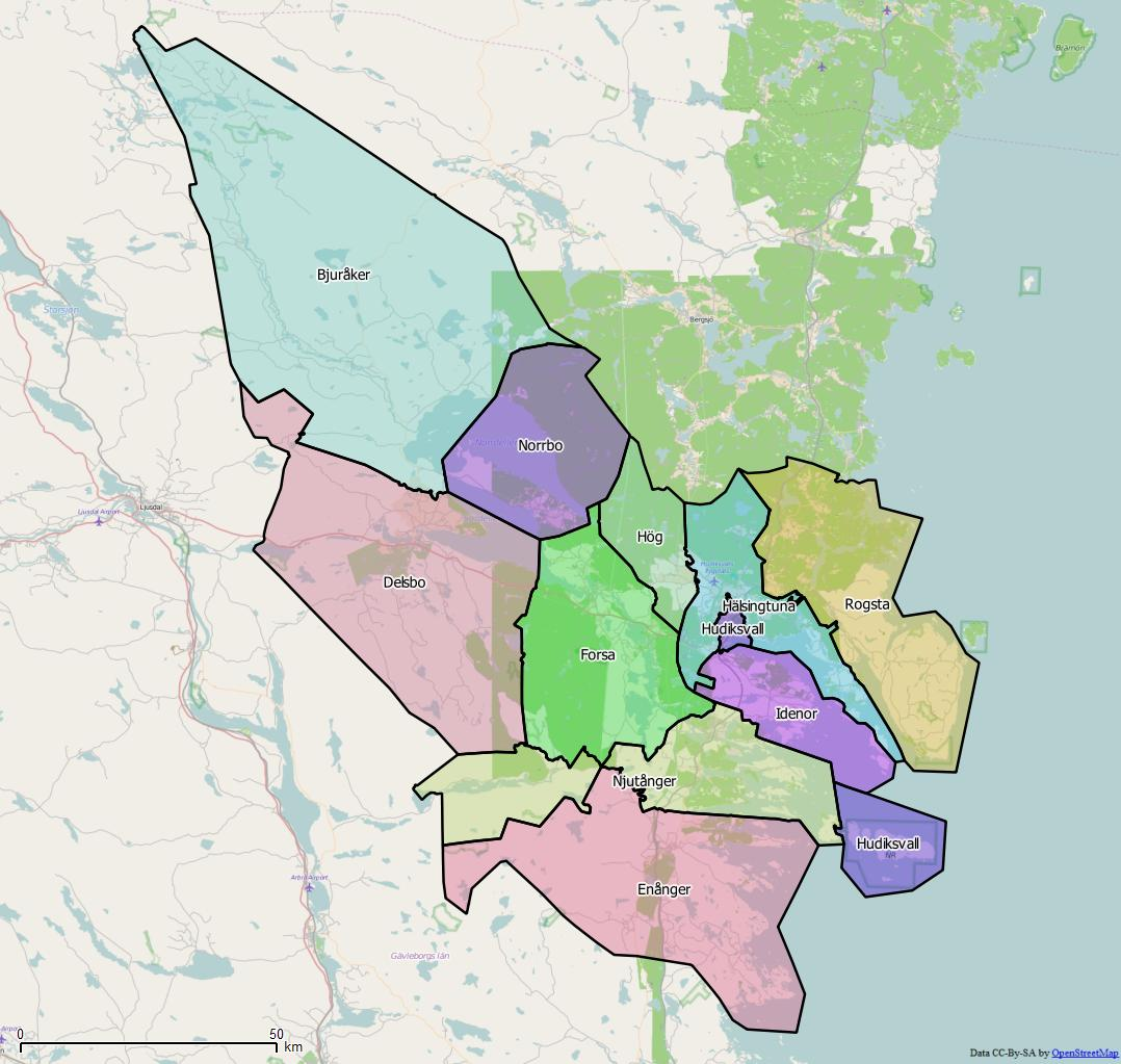 Distriktsindelningen i Hudiksvalls kommun